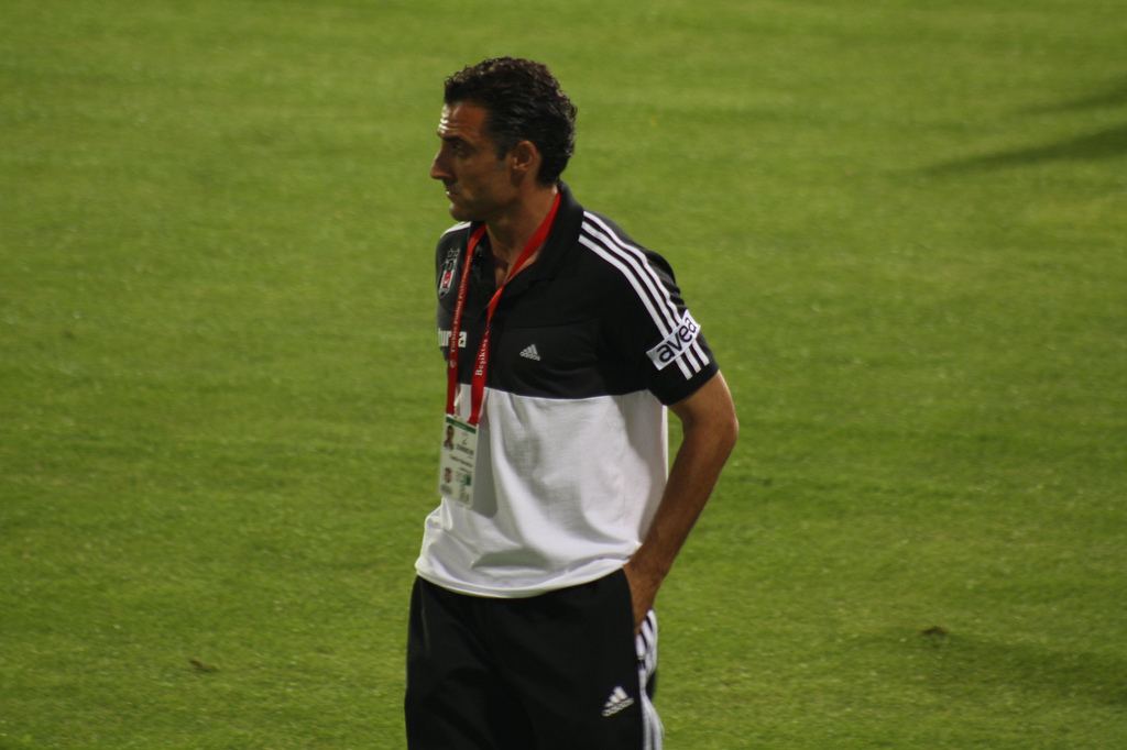 Tayfur havutçu 2009 Yardımcı Antrenör